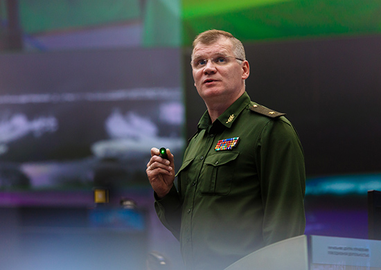 Брифинг начальника Управления пресс-службы и информации Министерства обороны Российской Федерации Игоря Конашенкова